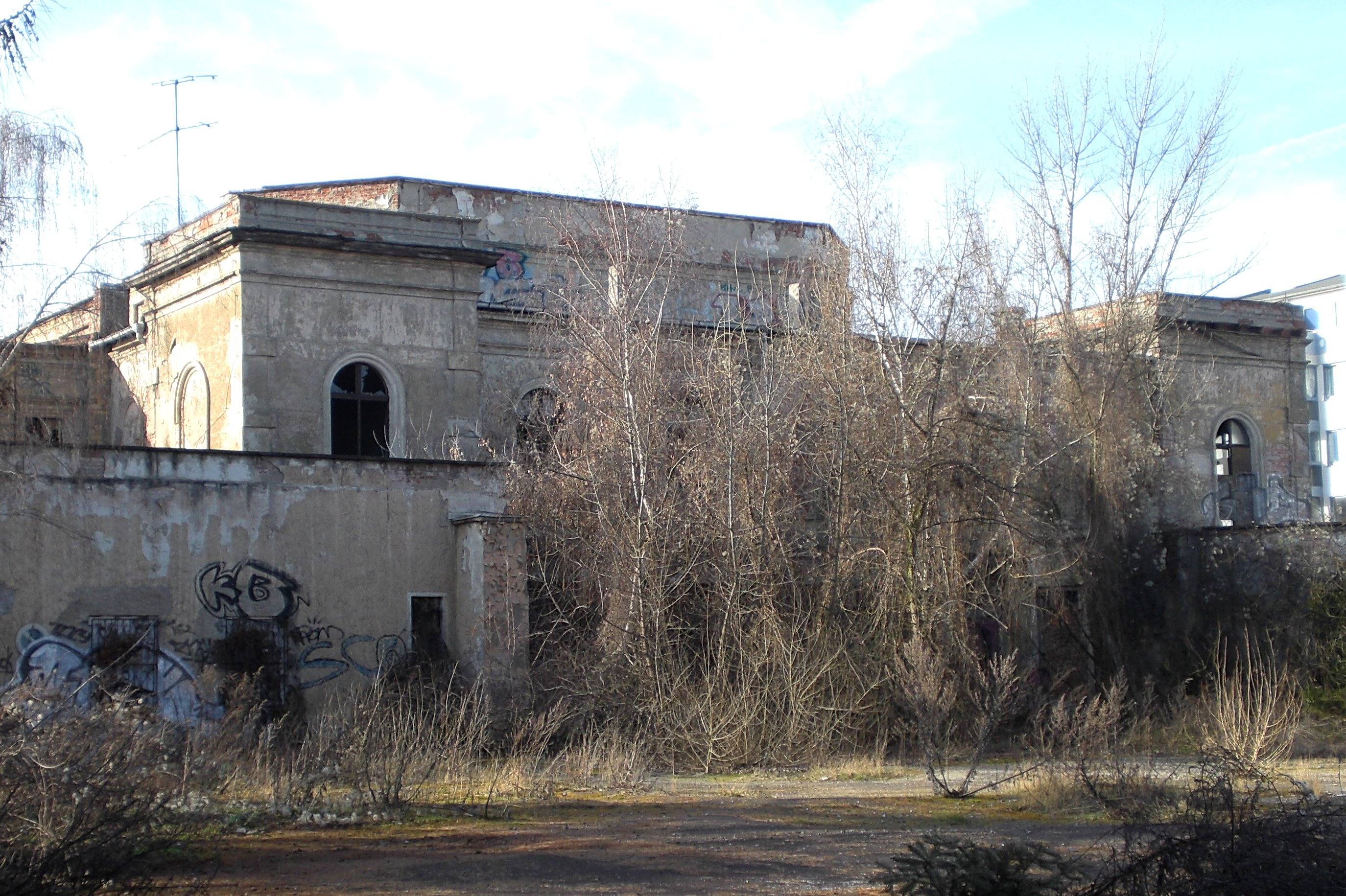 Kristall-Palast Magdeburg, Seite zur Leipziger Straße